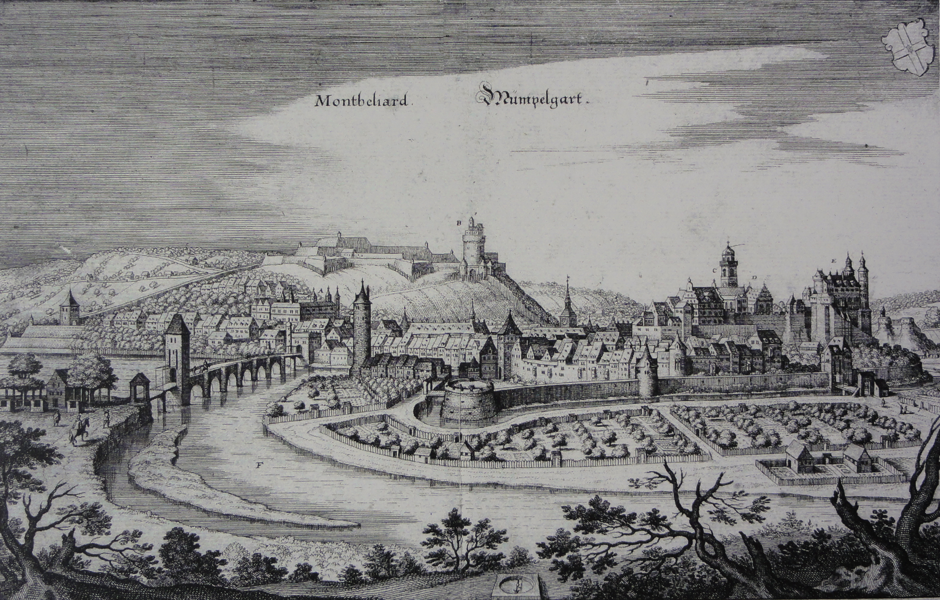 Вид на город и крепость Монбельяр